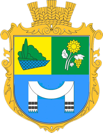 Герб села Баннівка, Болградський район